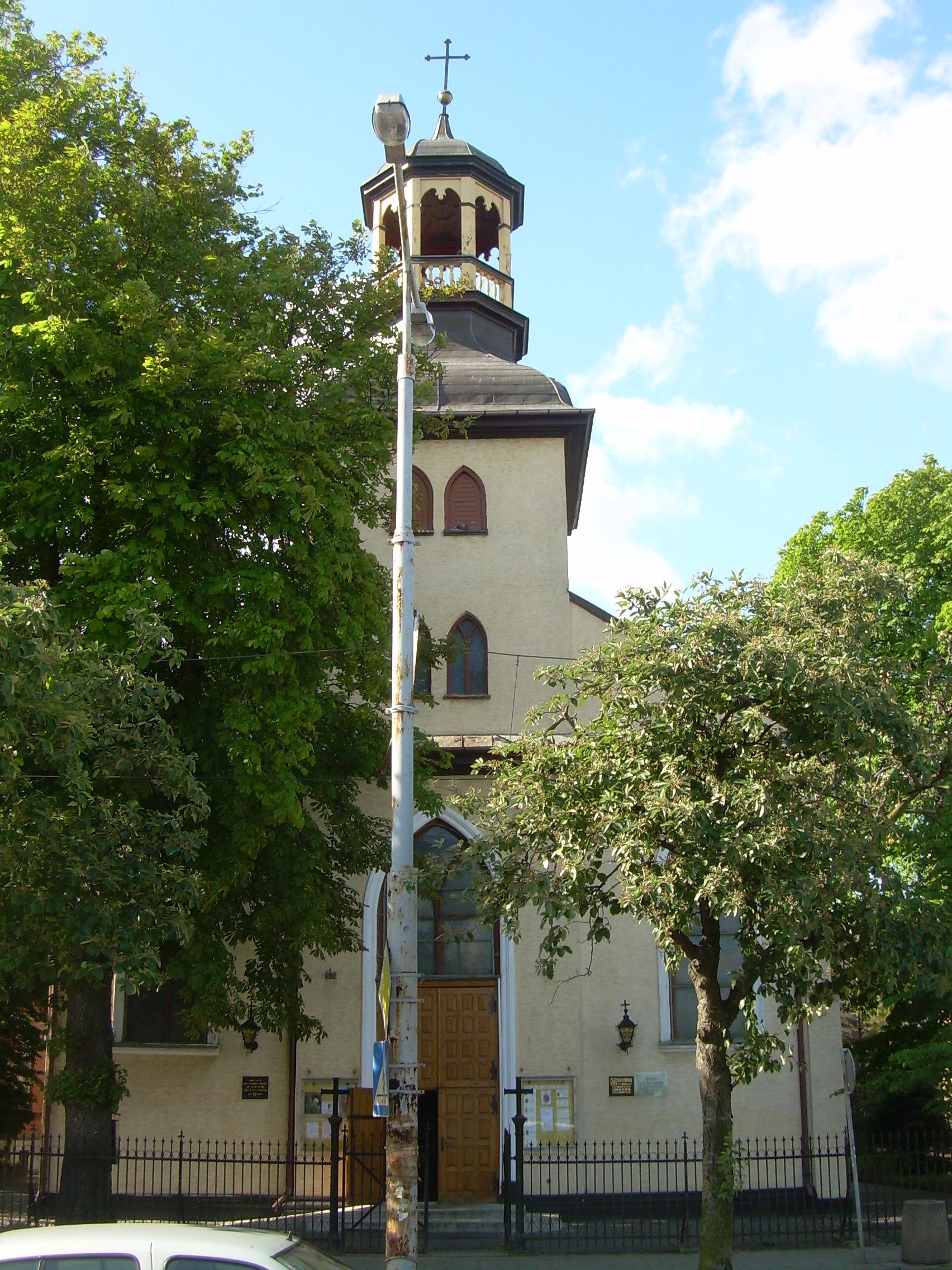 Nowy Port in Gdańsk.